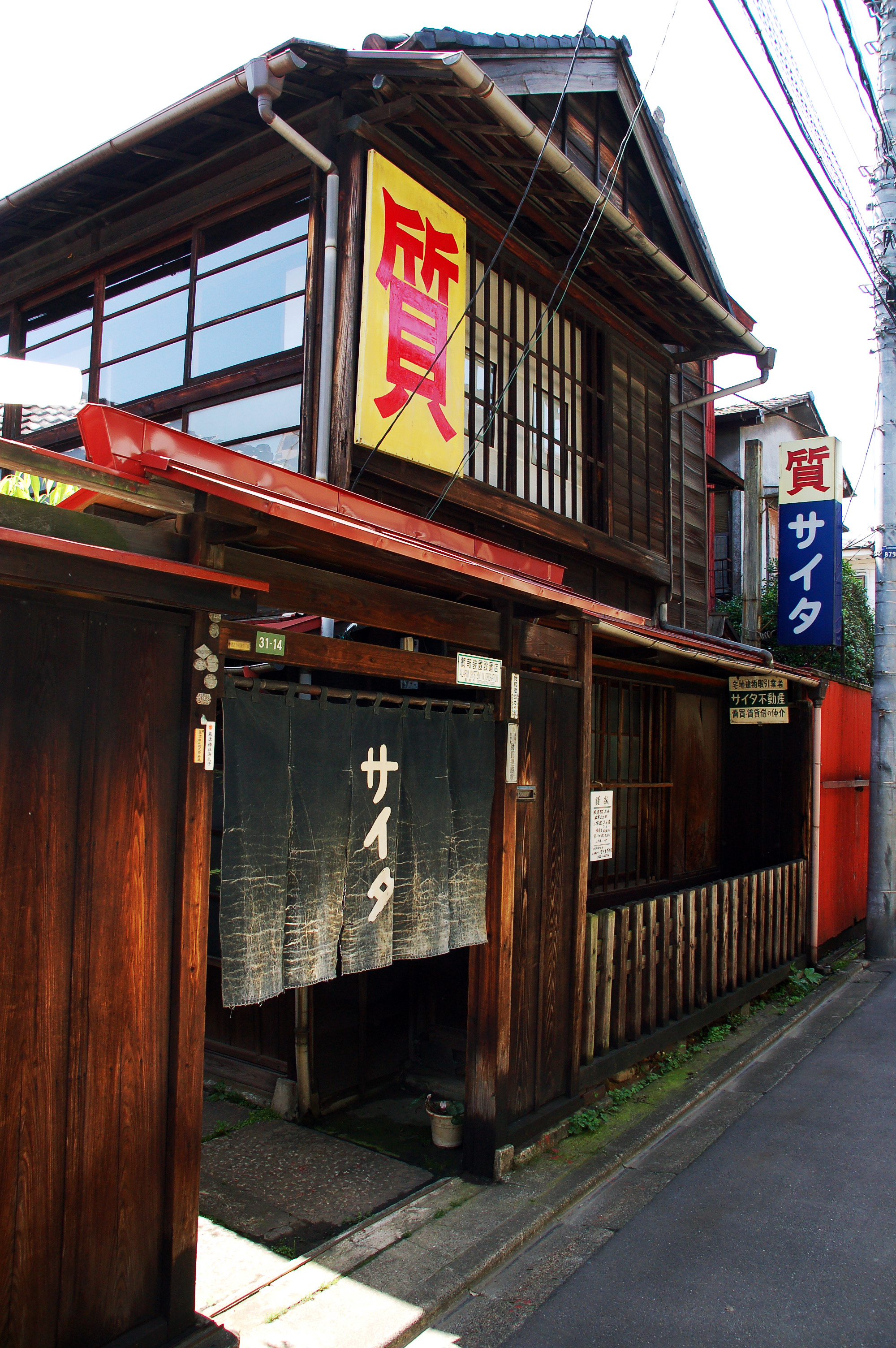 2006.05.20 13:18, Tokyo Nezu (根津)